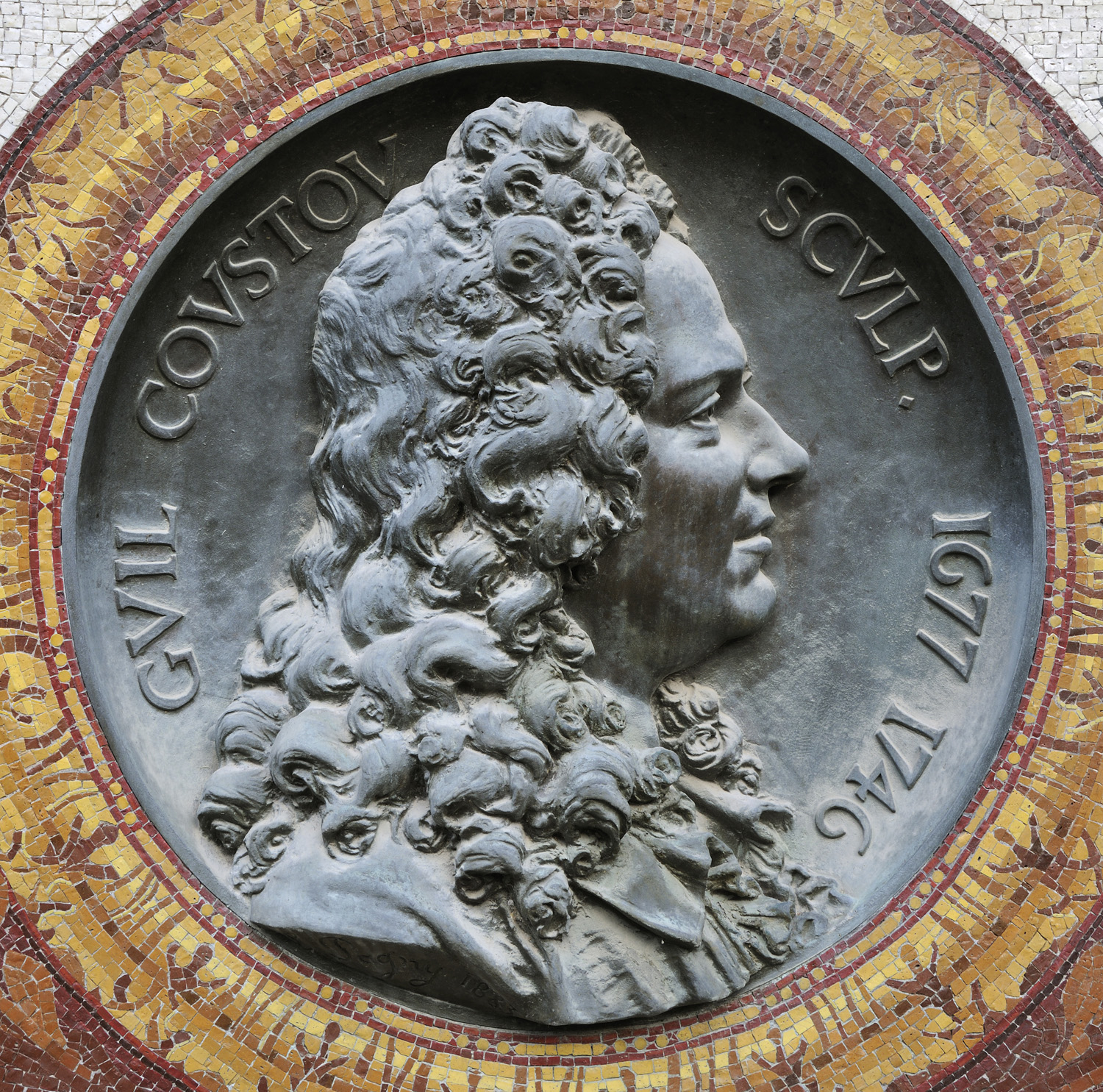 Médaillon de bronze à l'effigie de Guillaume Coustou, réalisé par Étienne Pagny (1829-1898)